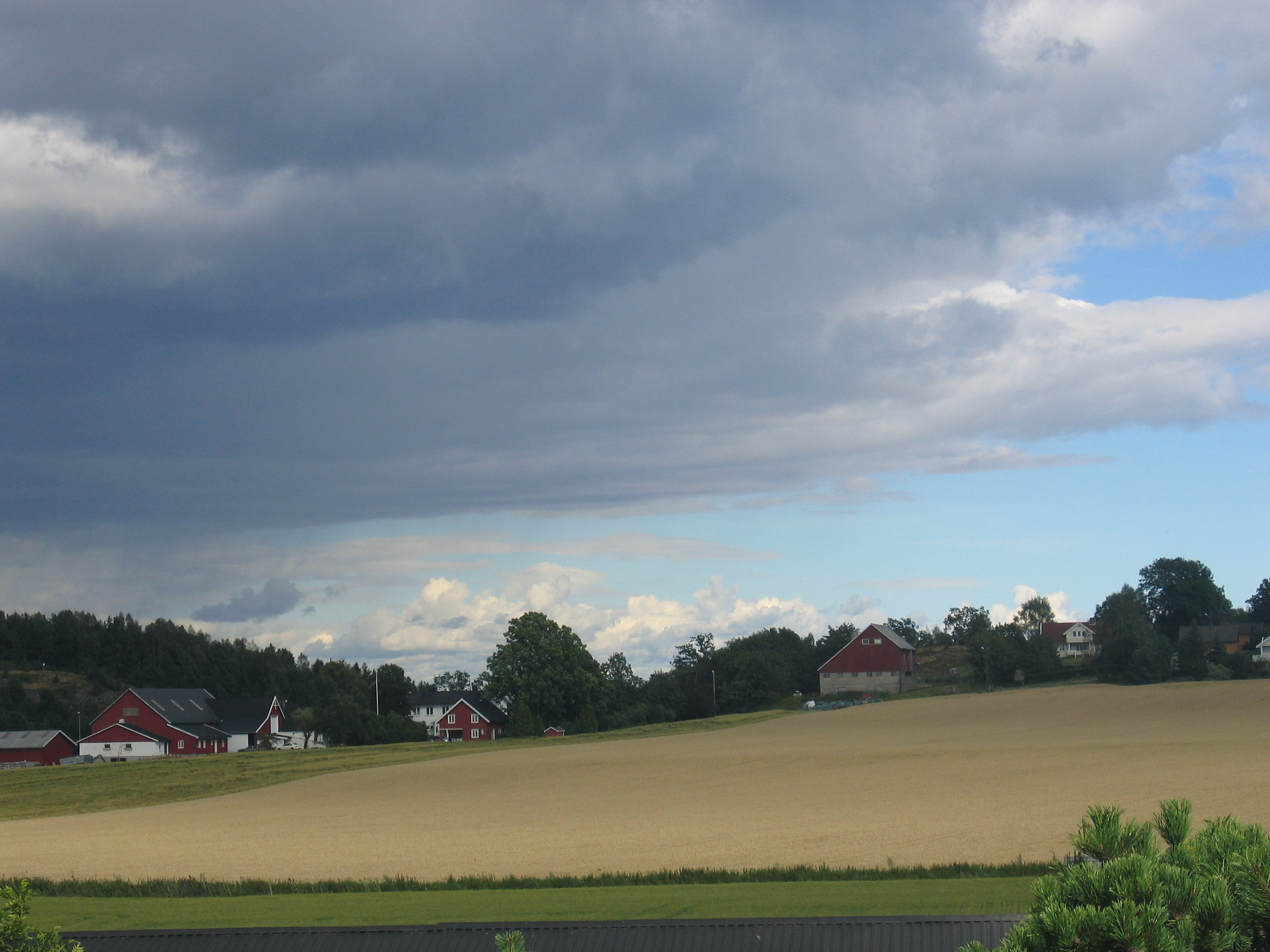 Nøtterøy jordbrukslandskap